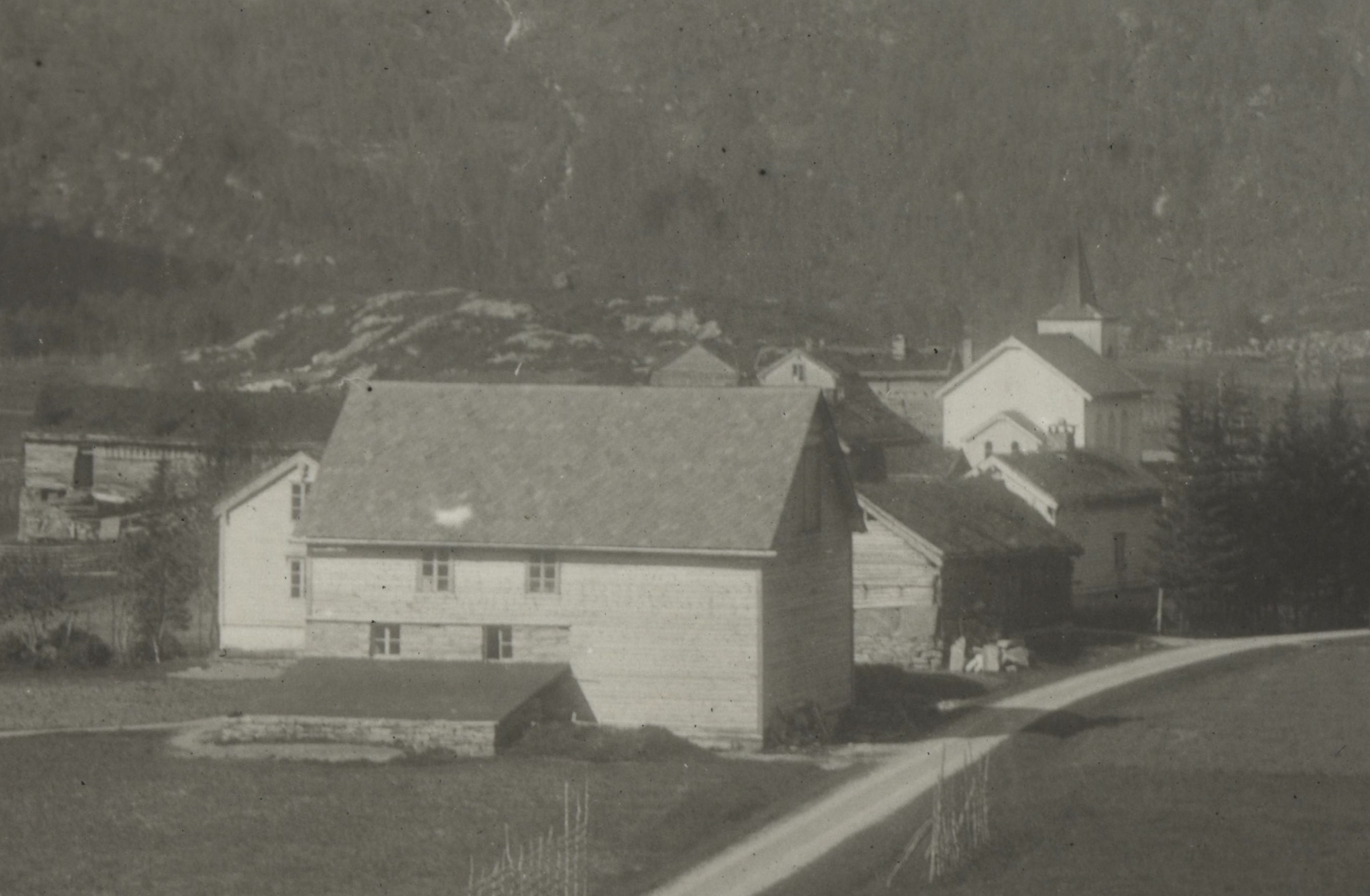 Postkortmotiv fra Flatekvål med Eksingedalen kirke. Utsnitt av postkortmotiv.